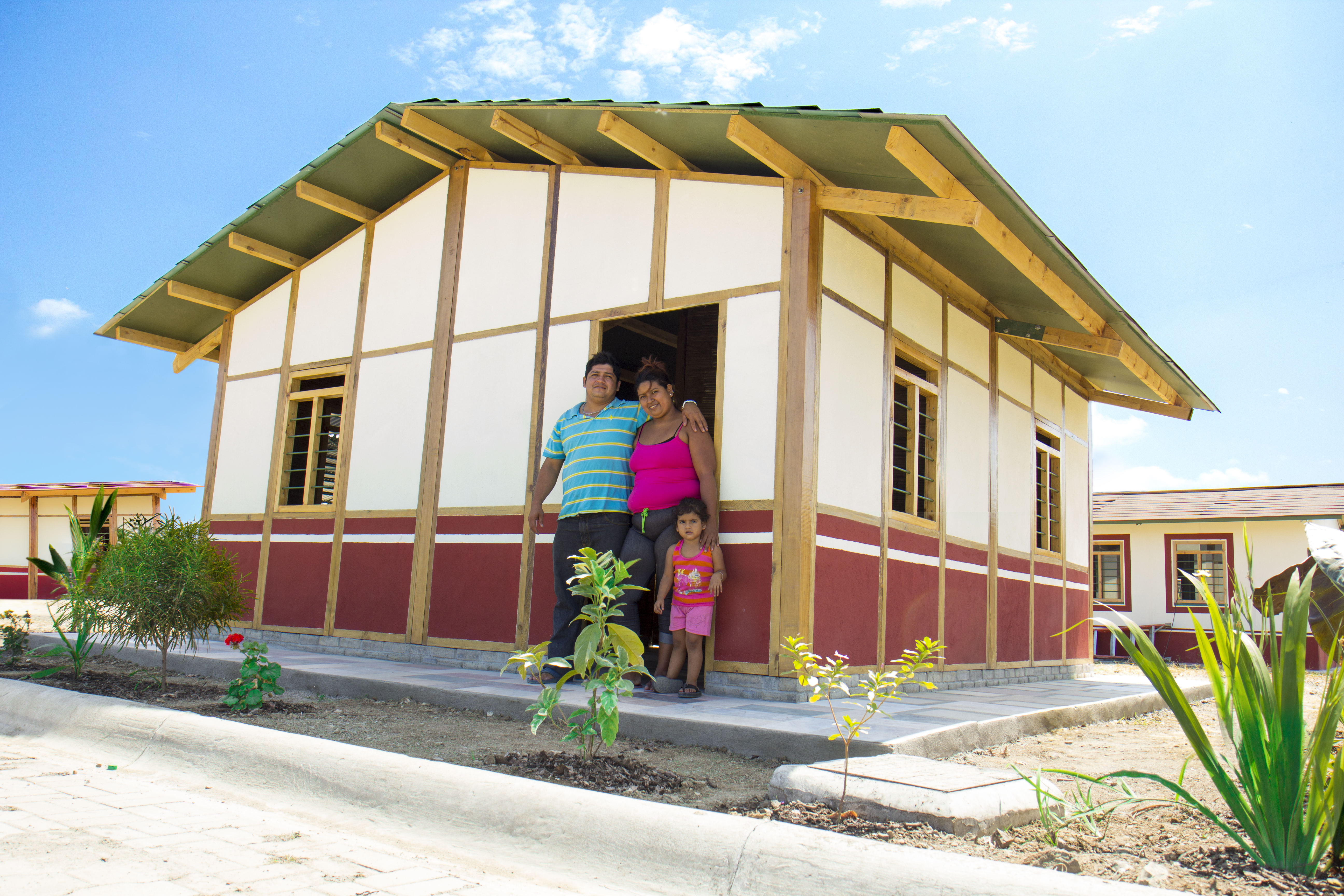 Madera, Caña y Hormigón (MACAHO), modelo de vivienda alternativo_2013